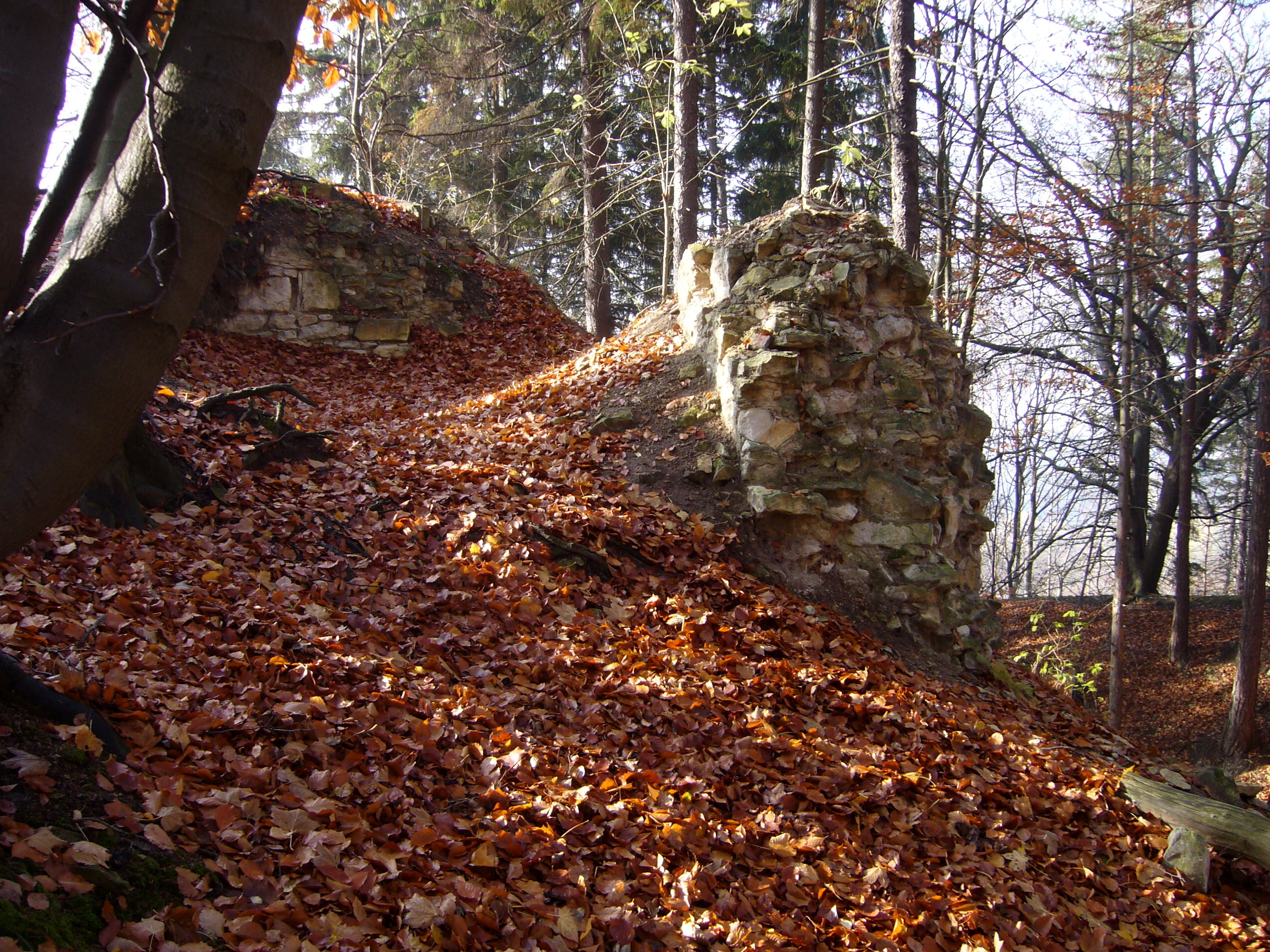 Fragment zdiva v severozápadním nároží ,hrad Džbán, jihozápadně od Lhoty, k. ú. Mutějovice a k. ú. Lhota pod Džbánem, Mutějovice.